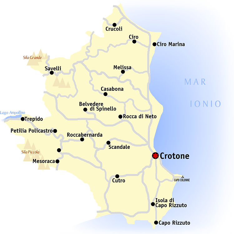 Kaart van de provincie Crotone